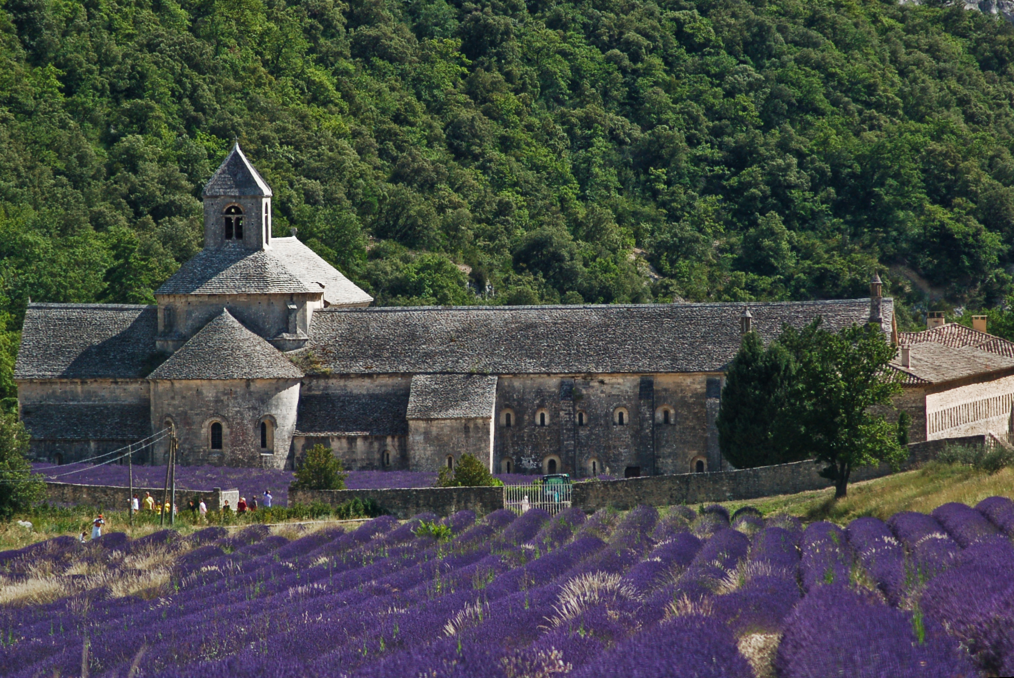 Abbaye de Sénanque vue du Sud avec ses champs de lavande